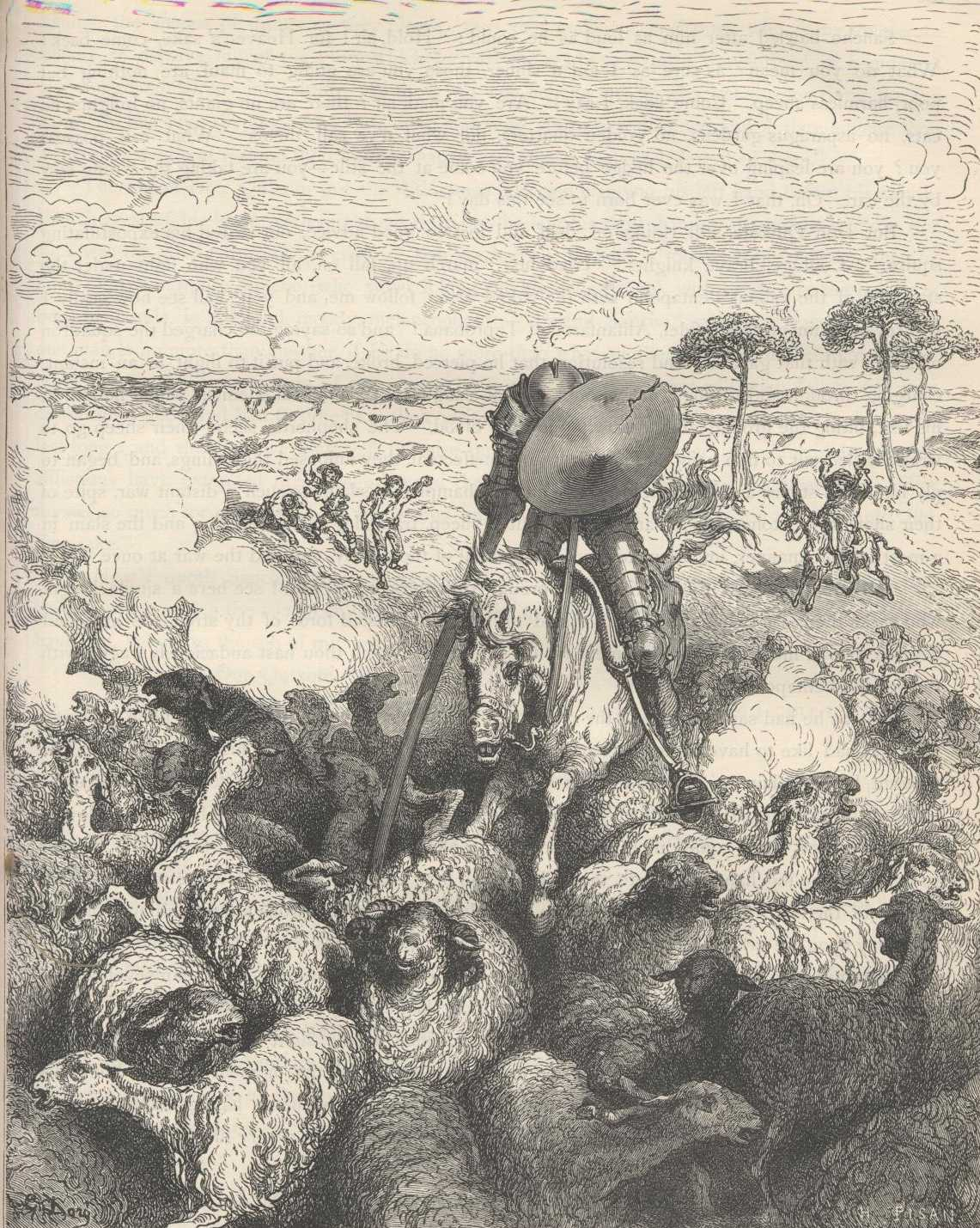 Dom Quixote ataca o rebanho de ovelhas julgando que de um exército se tratava , vendo-se ao longe os pastores a atirar-lhe pedras com fundas e Sancho Pança com as mãos no ar muito preocupado.